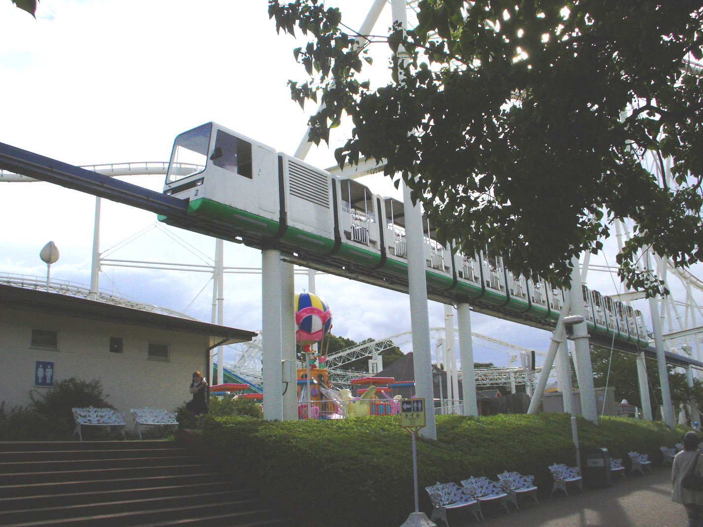 Vista Liner of Expo Land, Suita, Osaka.